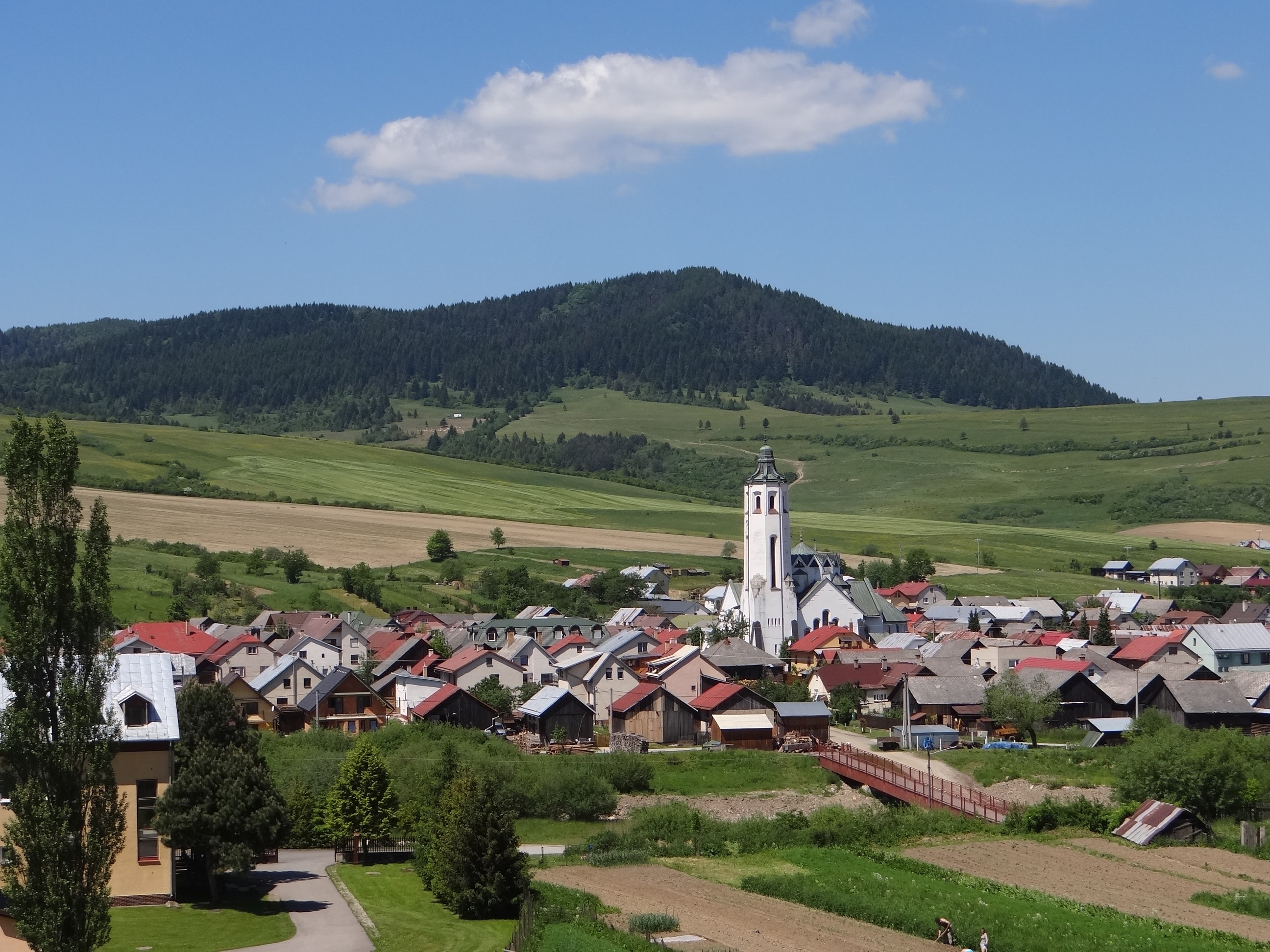 Jakubany